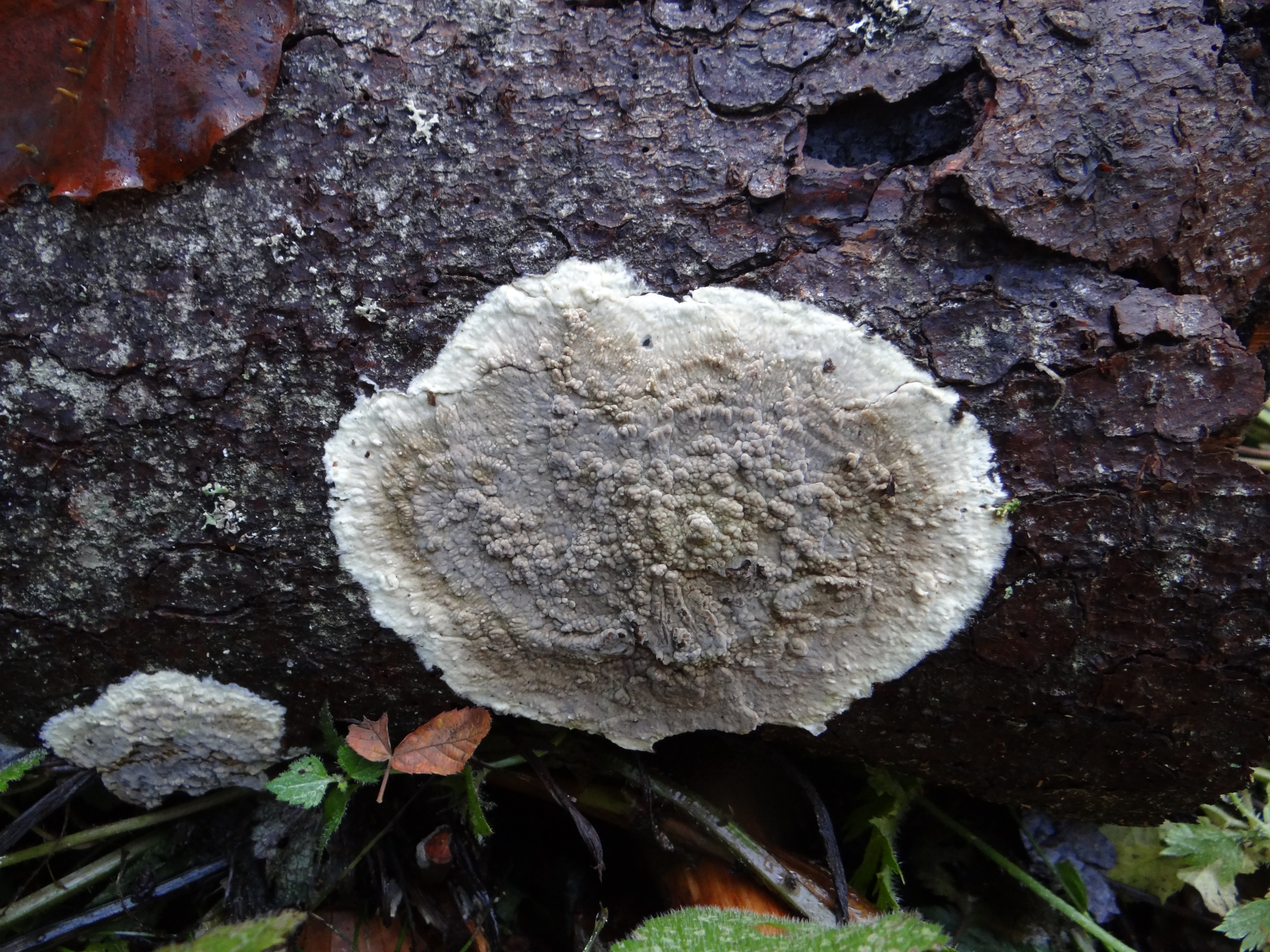 Phlebiopsis gigantea